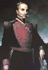 Retrato del General Diego Ibarra por Martín Tovar y Tovar (1827 - 1902)